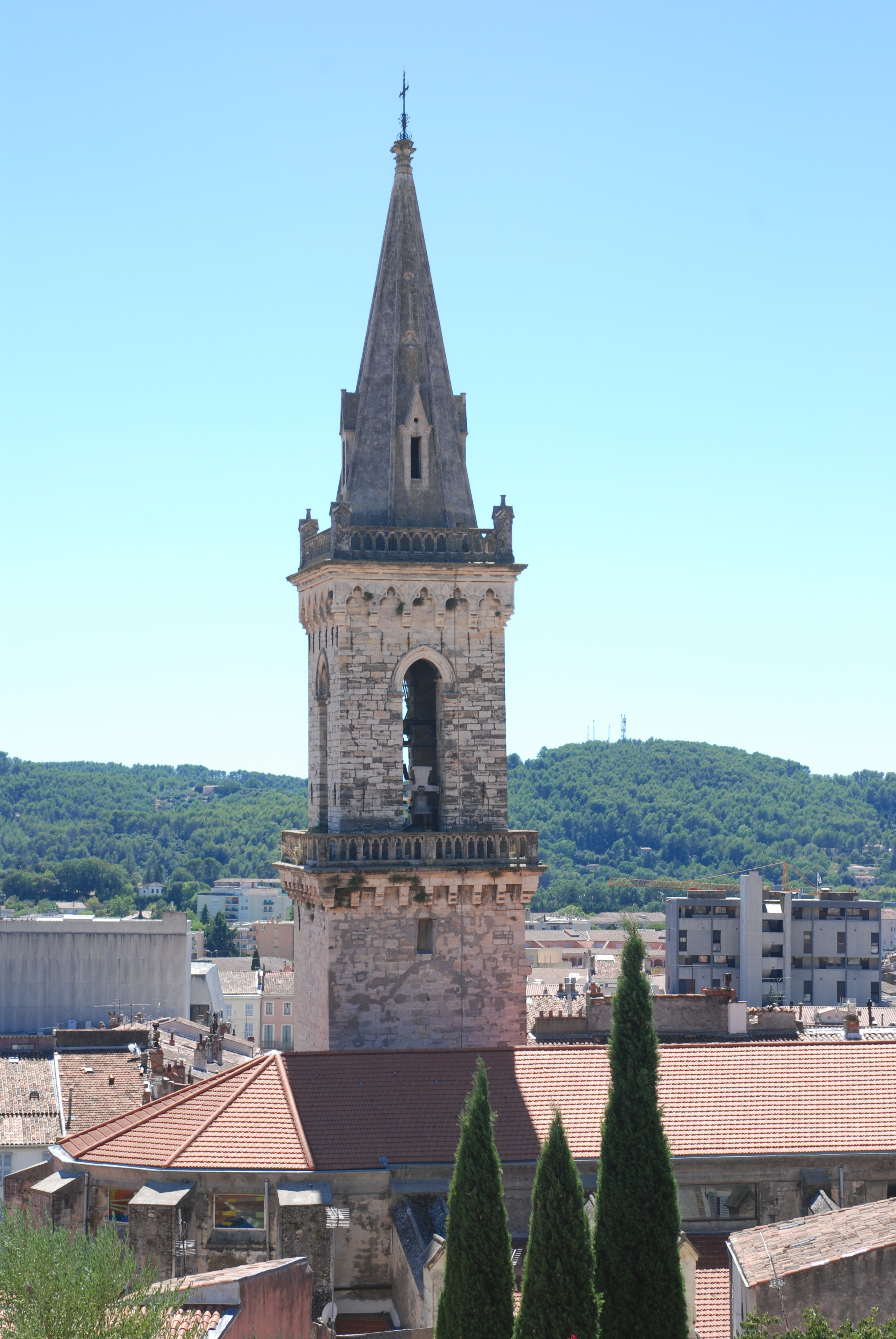 Turm der Église Saint Michel, Draguignan Département Alpes-de-Haute-Provence, (France)